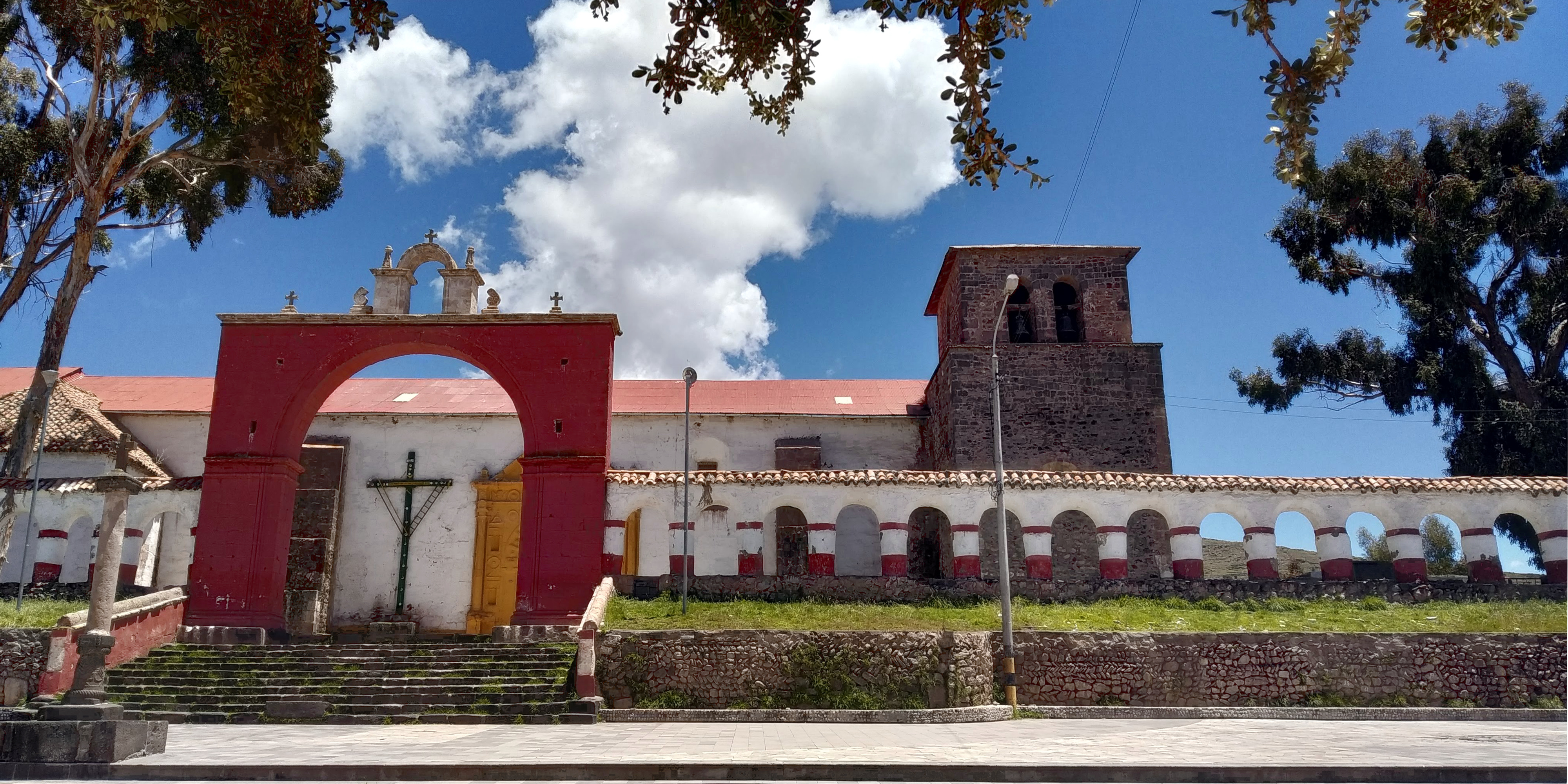 Chucuito es un pueblo en la orilla de Lago Titicaca, cerca de la ciudad de Puno.